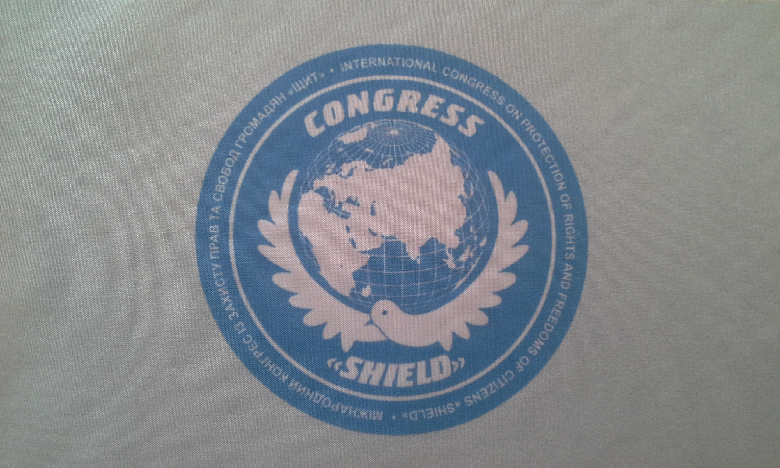 Фото флага (в Штаб-квартире конгресса) с логотипом конгресса "Щит"